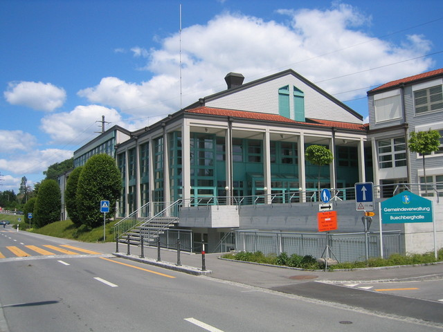 Mehrzweckhalle in Wangen